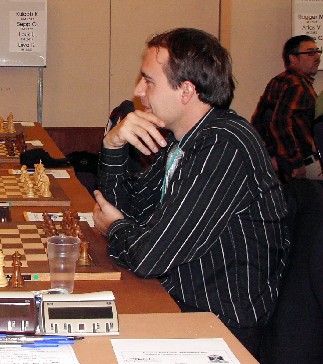 GM Kaido Kulaots (Estonia), EuroChess Iraklion 2007